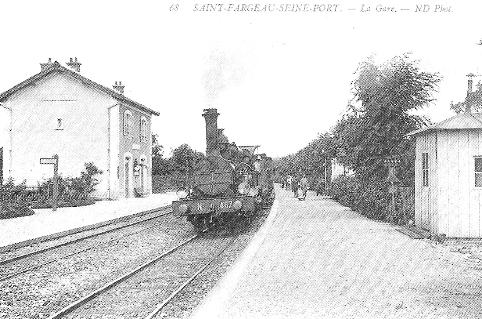 Ancienne gare de Saint-Fargeau (Essonne, France), au début du XX° siècle.